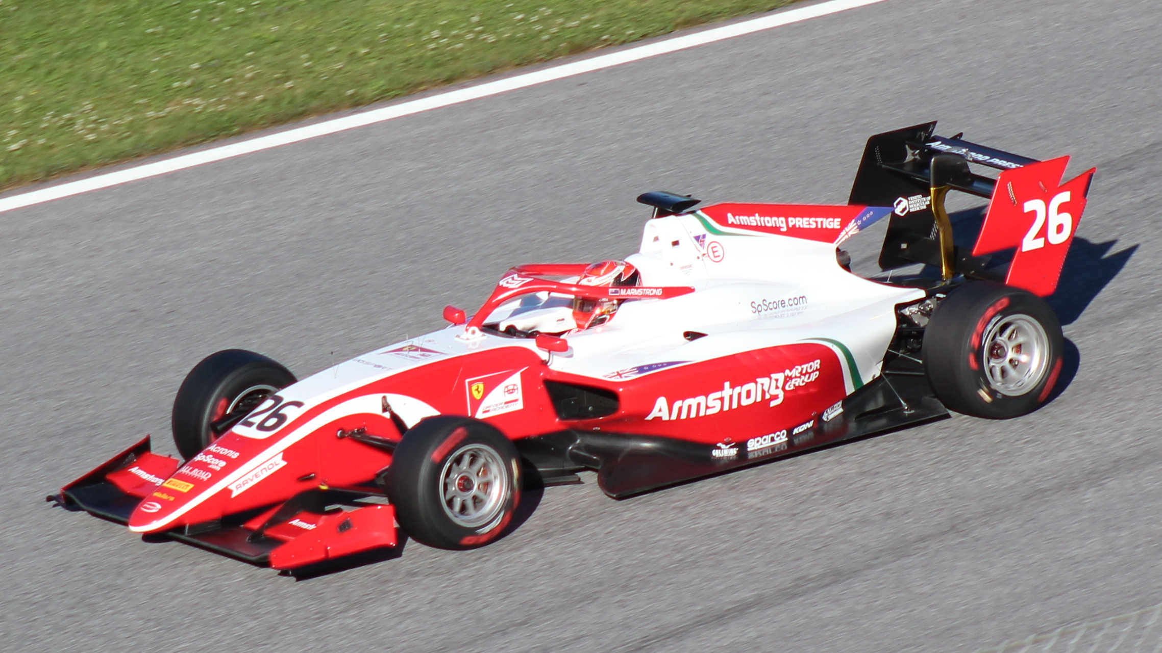 Armstrong beim Rennwochenende in Österreich 2019